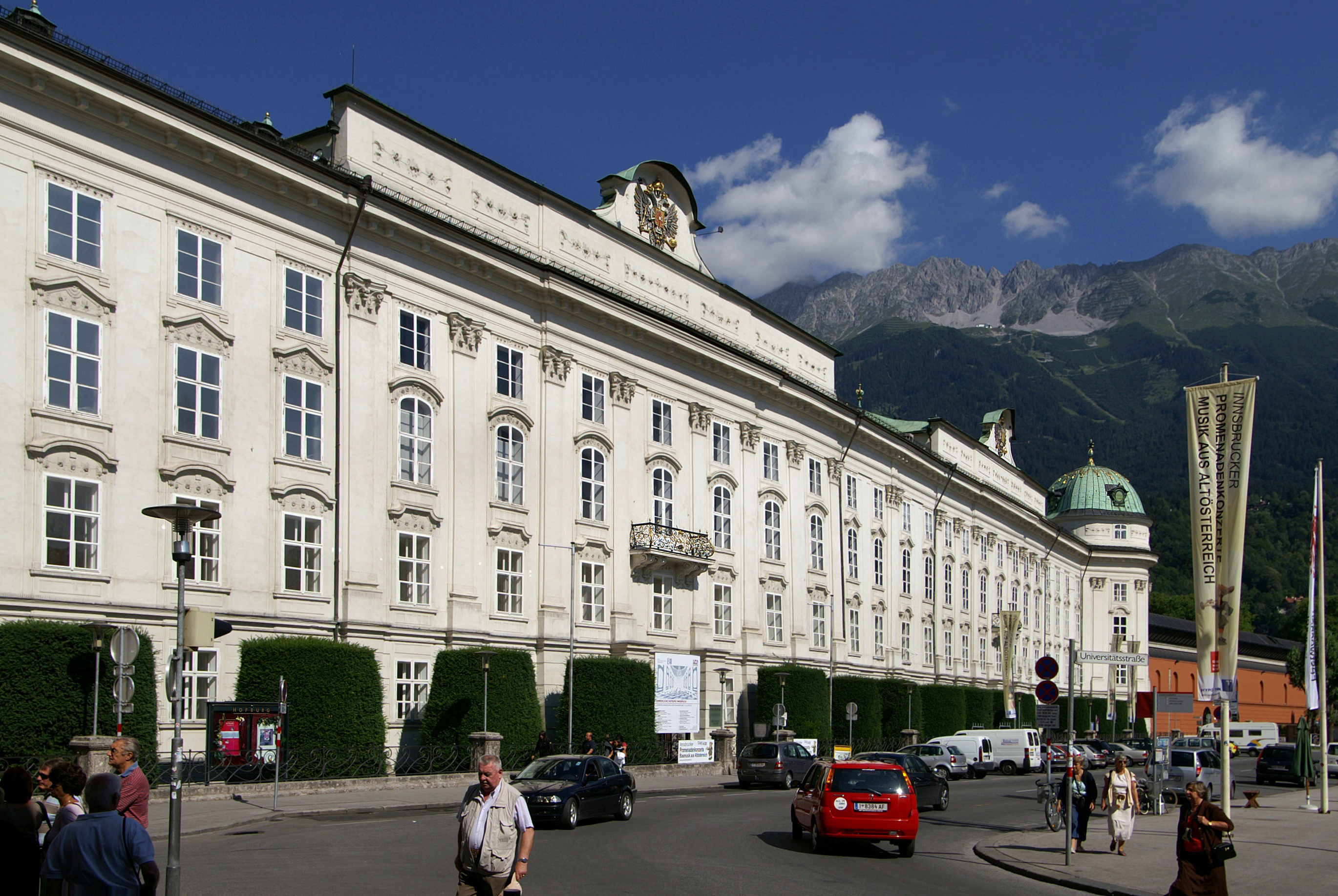 Die Hofburg (Innsbruck) war einst Sitz der Tiroler Landesfürsten.